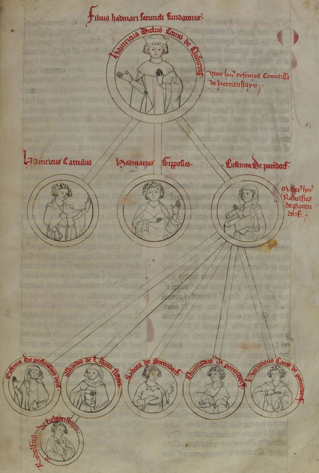 Kuenringer-Stammbaum auf f. 27r der Bärenhaut - Kuenringer-Stammbaum (ganzseitig, 10 Medaillons, Fortsetzung von fol. 18r): Heinrich I. canis und seine Nachfahren: Hadmar IV. gypposus (der Bucklige), Heinrich III. catulus (junger Hund) und Eufemia von Pottendorf mit ihren Kindern